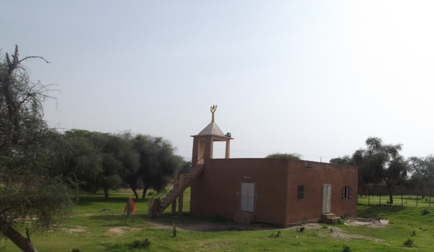 مسجد وقت الظهيرة Masjid